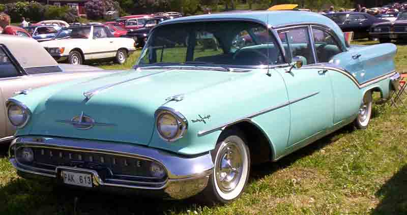 Oldsmobile Starfire 98 Holiday (Hardtop) Sedan 1957